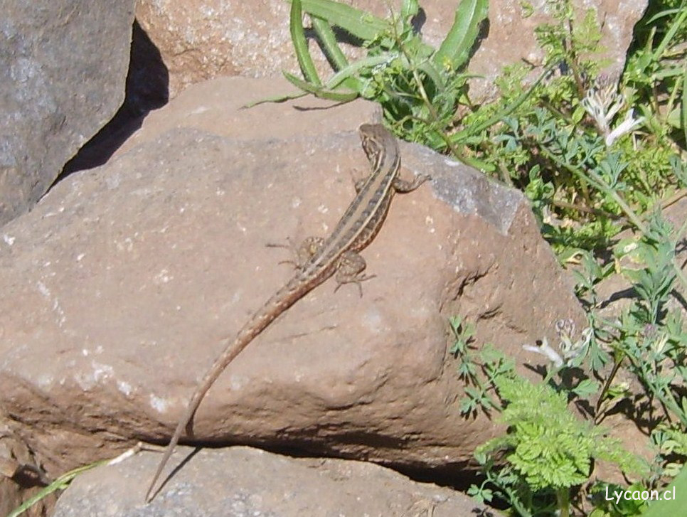 Lagartija lemnicata (Liolaemus lemniscatus), reptil endemico de Chile